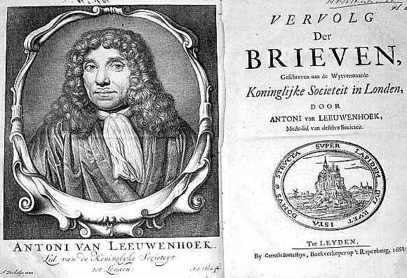 Vervolg der brieven geschreven aan de wytvermaarde Koninglijke Societeit in Londen door Antoni van Leeuwenhoek